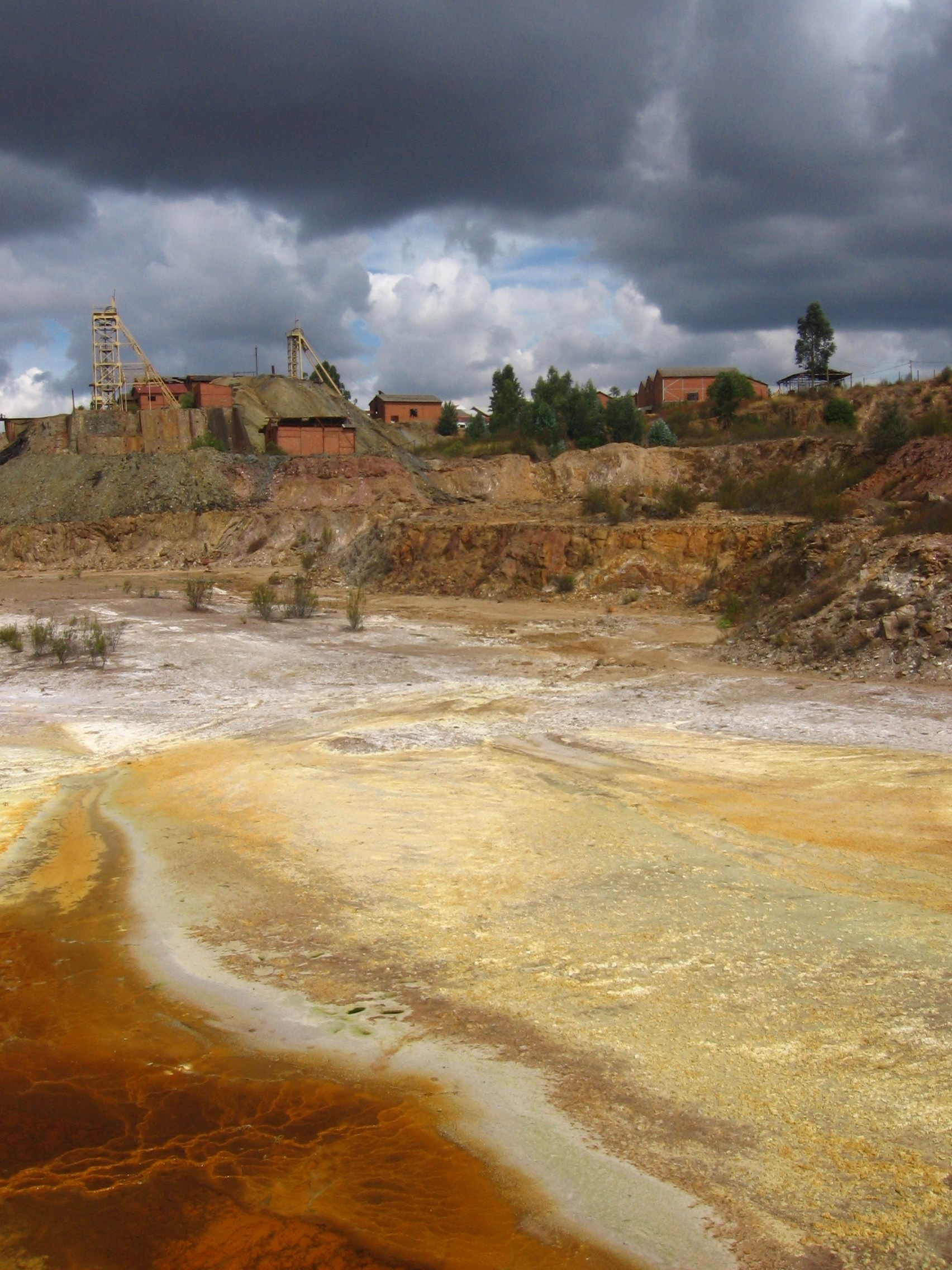 Lagoa ácida e instalações mineiras da antiga mina do Lousal, Grândola, Portugal